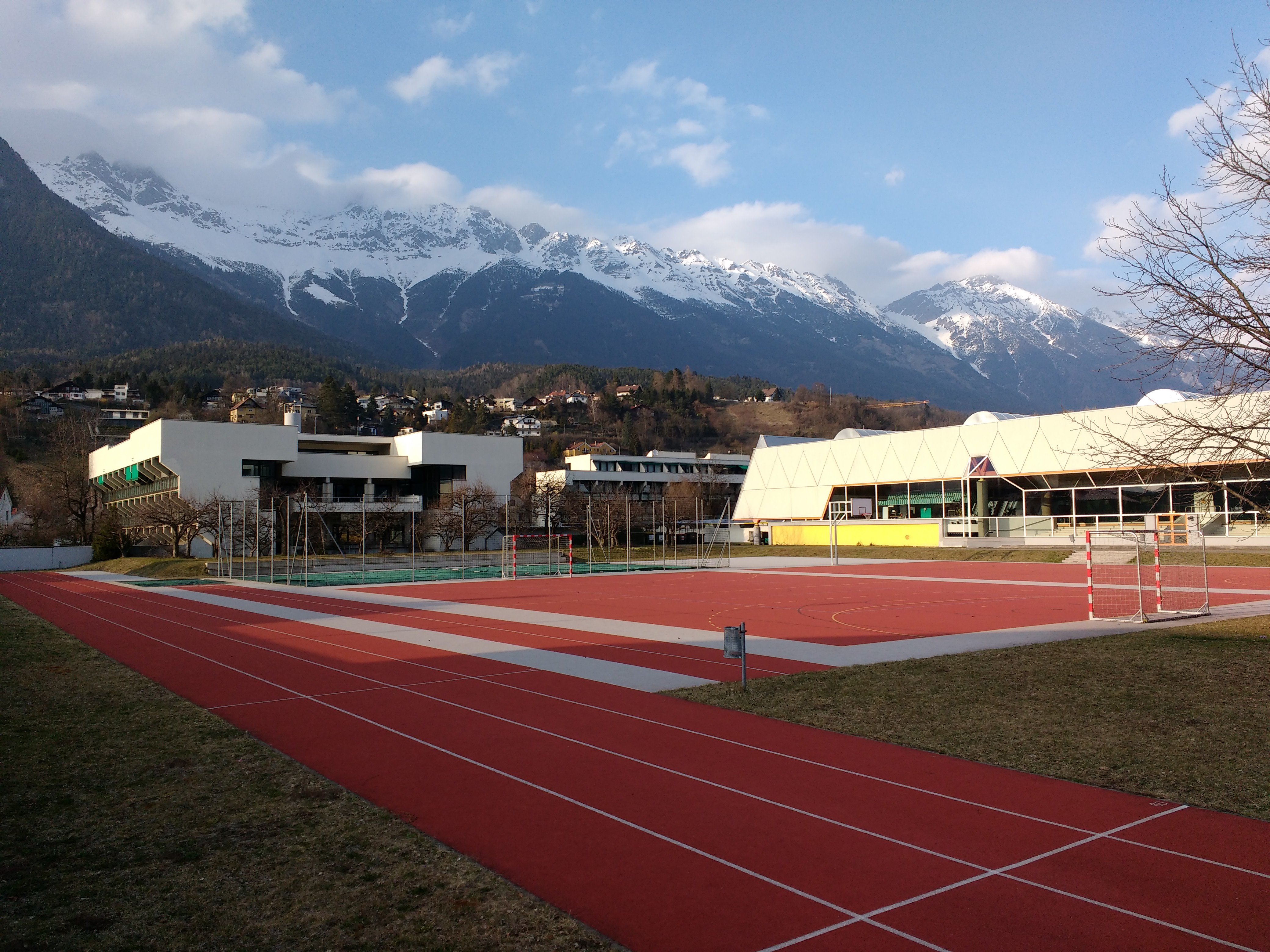 Ursulinenschule Innsbruck: Sportanlage. Links hinten das Kloster. This media shows the remarkable cultural object in the Austrian state of Tyrol listed by the Tyrolean Art Cadastre with the ID 134102. (on tirisMaps, pdf, more images on Commons, Wikidata)